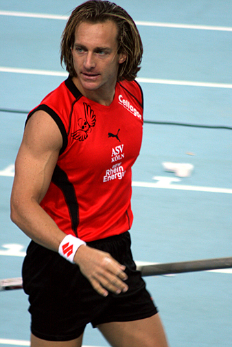 Tim Lobinger, German pole vaulter